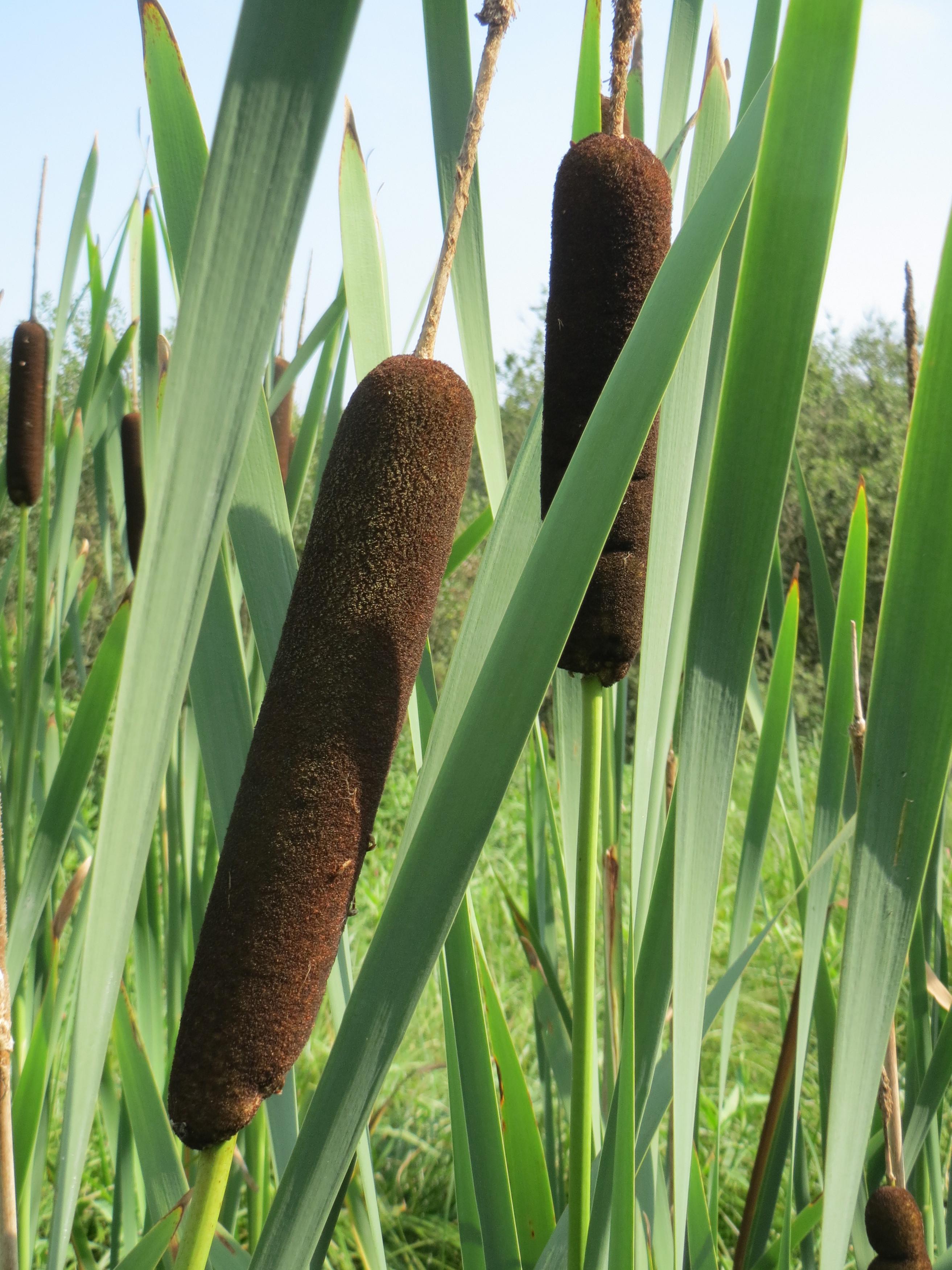 Breitblättriger Rohrkolben (Typha latifolia) im Naturschutzgebiet Mürmes